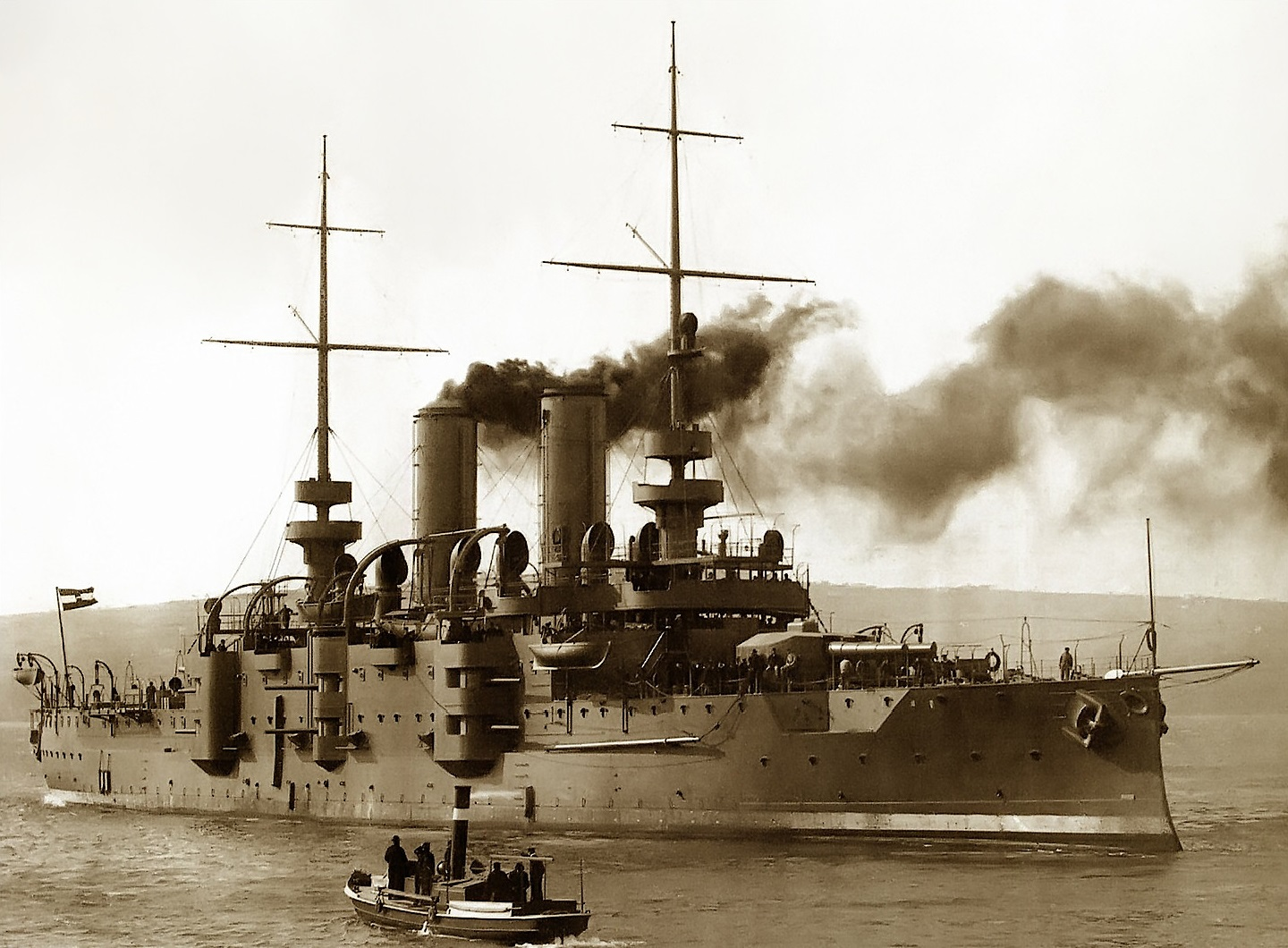 SMS Babenberg